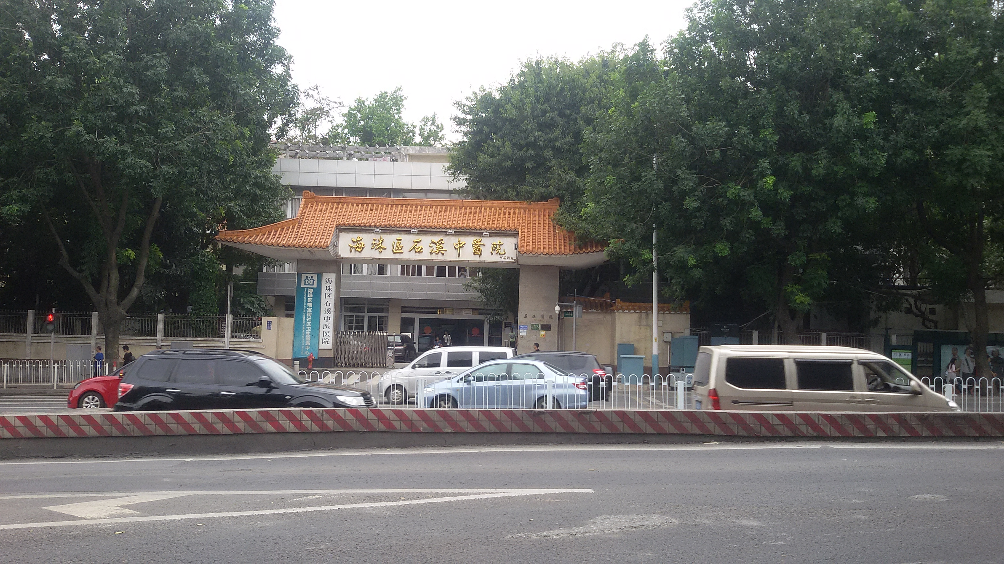 粵語: 海珠區石溪中醫院